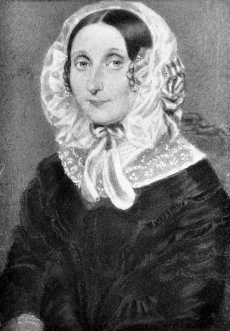 Miniatur von Henriette Gomperz geb. Auspitz, die Mutter des österreichischen Philologen Theodor Gomperz